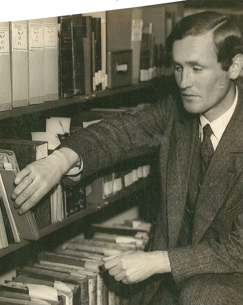 portrett, mann, historiker, riksarkivar, forfatter, halvfigur, bokhylle.